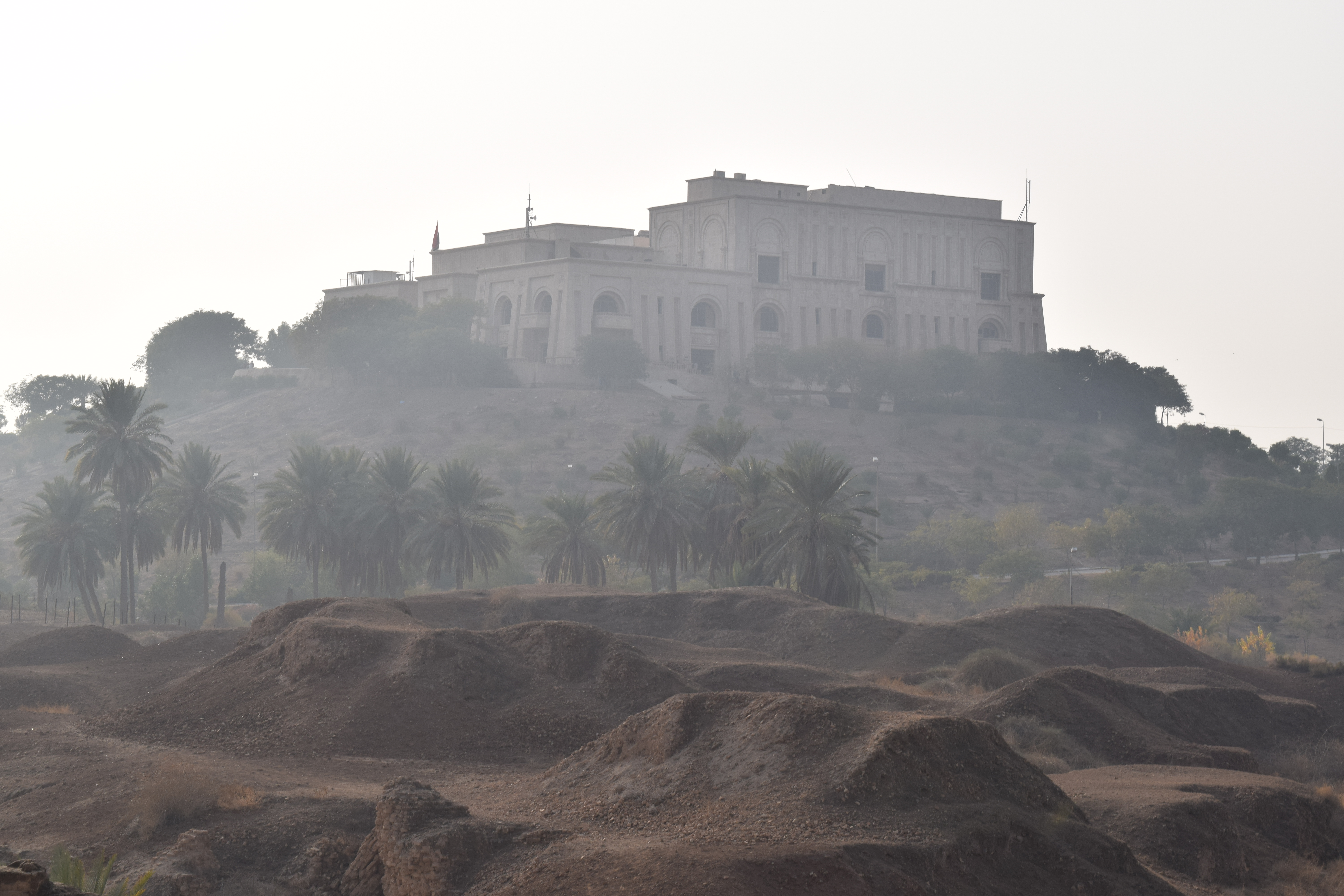 أحد قصور صدام حسين، يقع بالقرب من مدينة بابل الأثرية في الحلة. العراق.